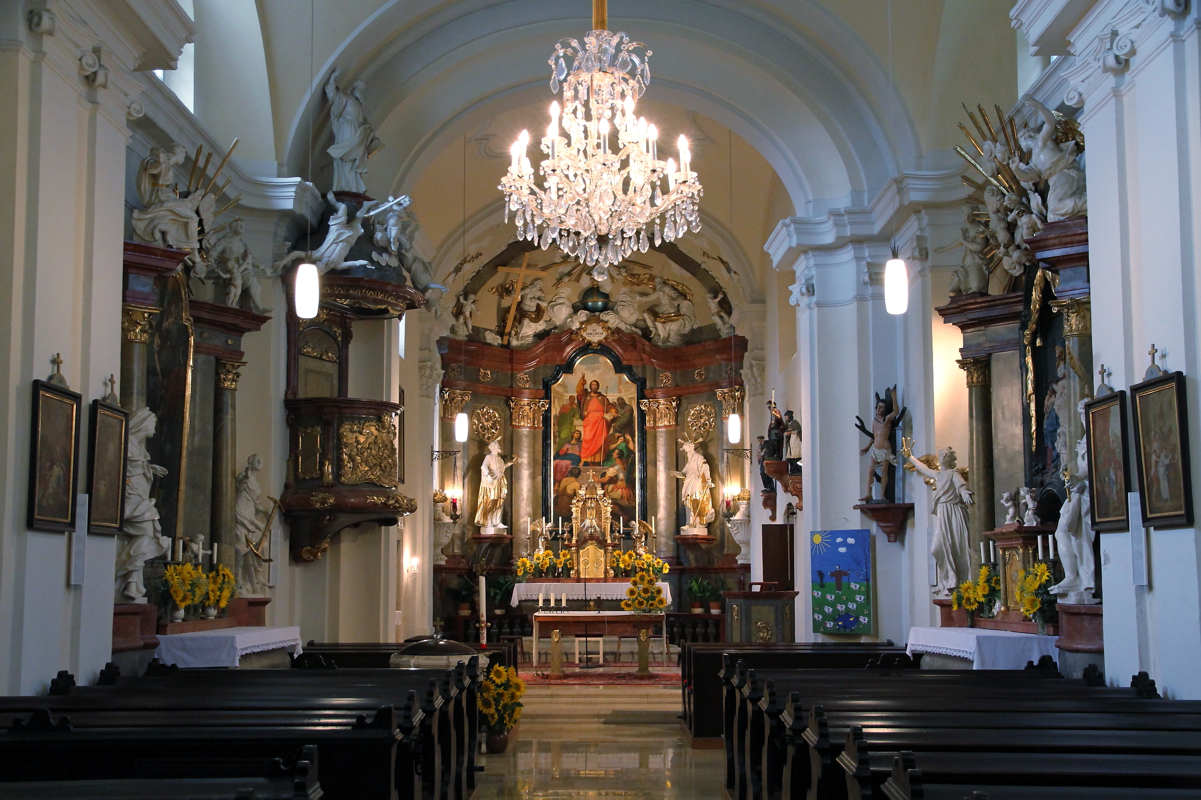 Innenansicht der katholischen Pfarrkirche hl. Jakob der Ältere in Etsdorf, ein Ortsteil der niederösterreichischen Marktgemeinde Grafenegg.